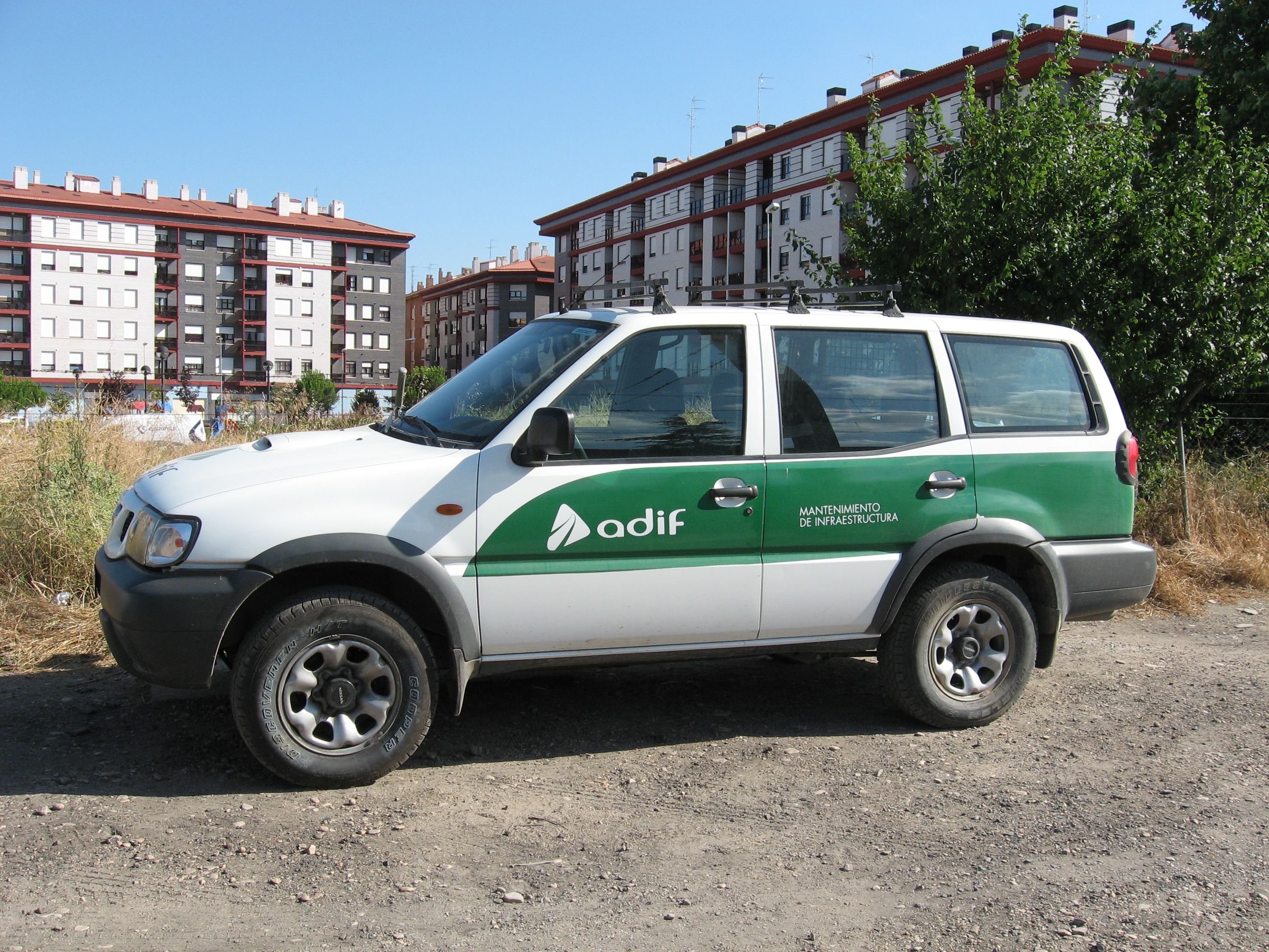 Desc: Vehículo de Adif